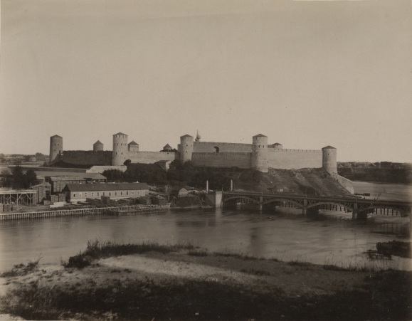 Jaanilinn ja Narva sild